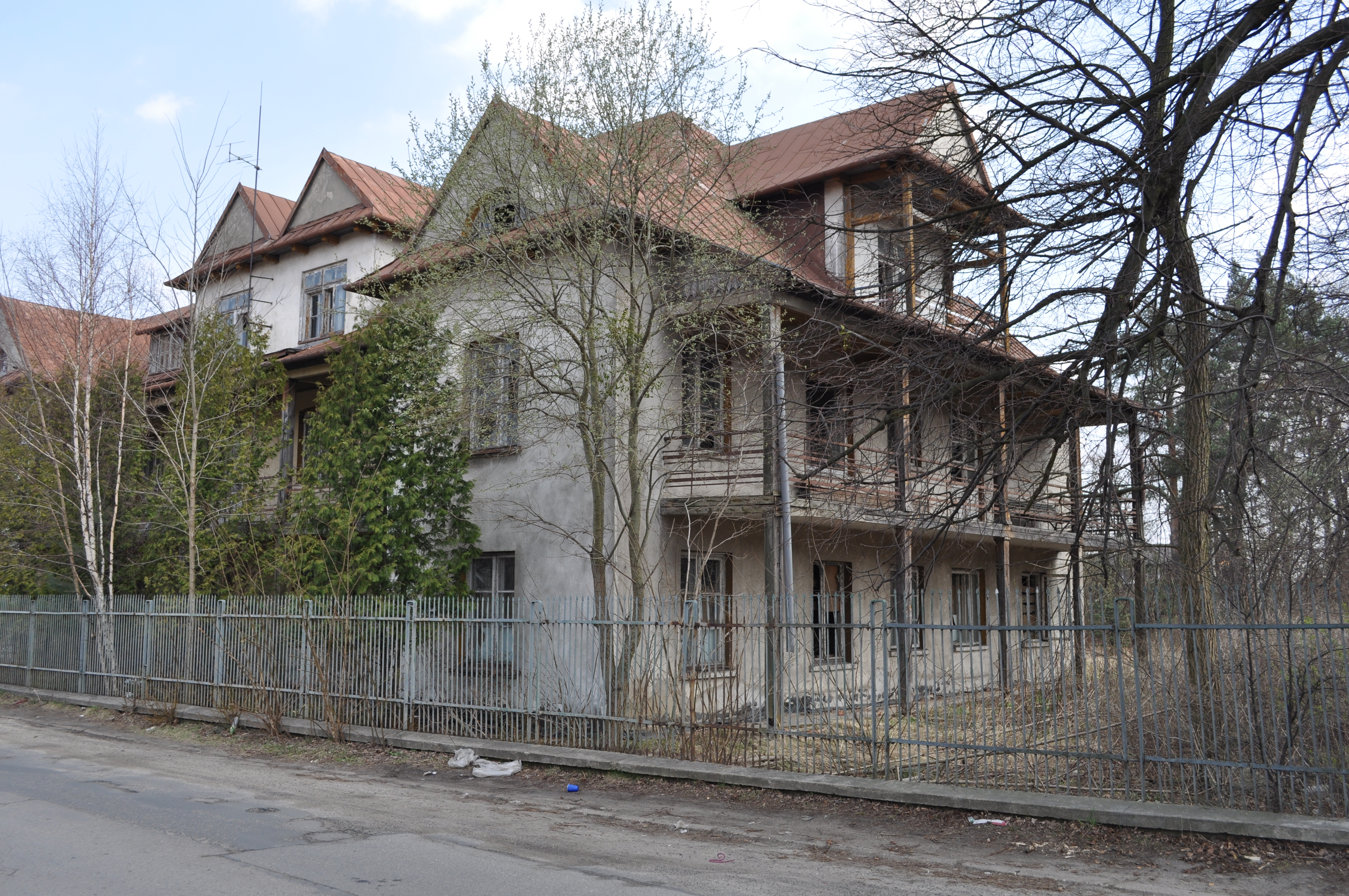 Landratura